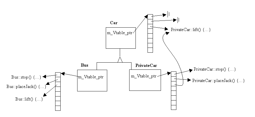 שירטוט סכמטי של הררכית ירושה פשוטה עם טבלאות וירטואליות. מתאים לדוגמת המכוניות מפולימורפיזם